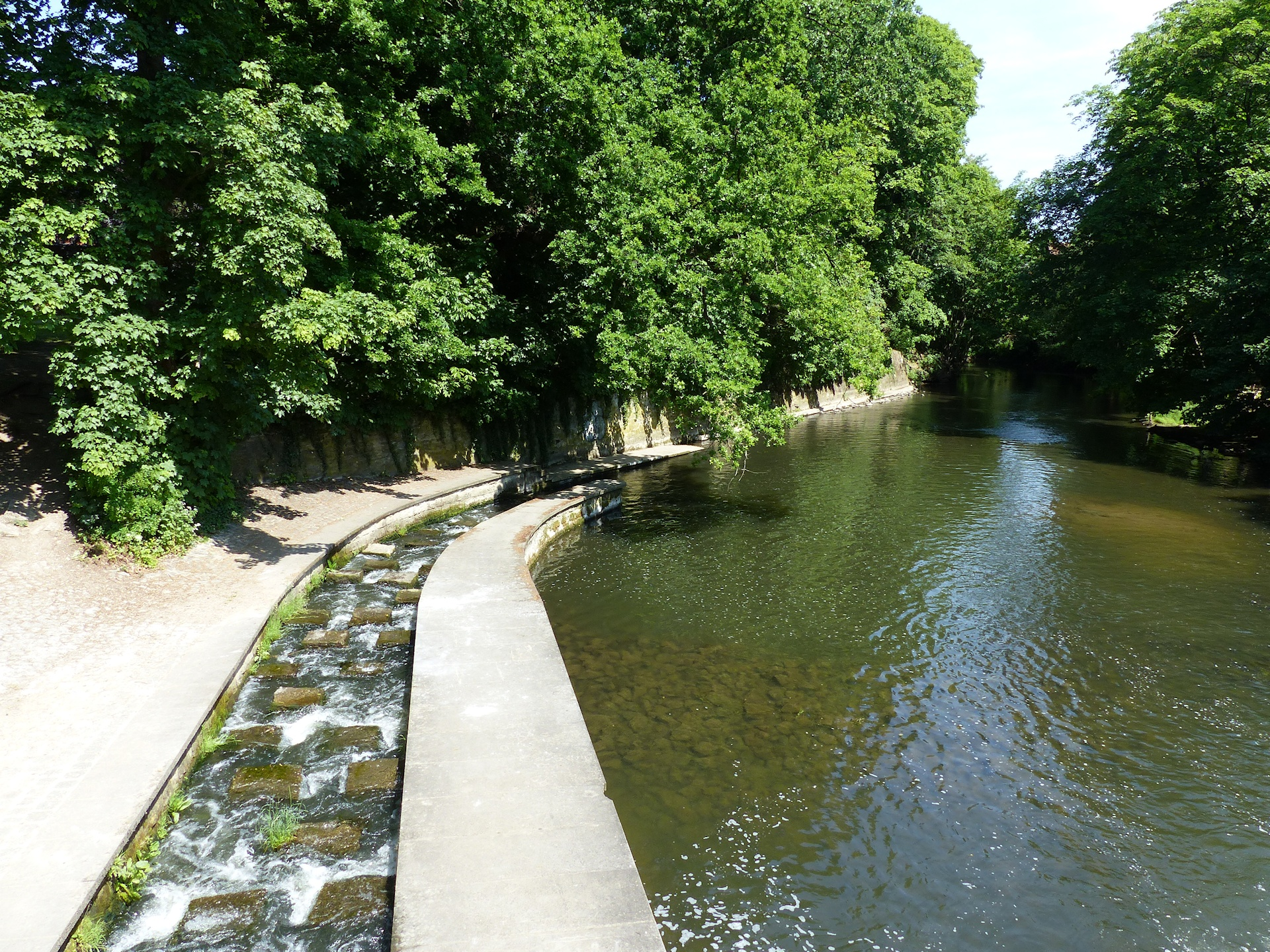 Fischpass am Okerabsturz Wallstraße/Marktstraße, Blick Nord.